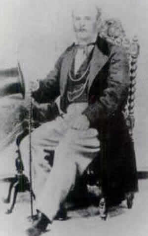 Francisco Rafael de Augier y Rojano de Oya y Ozores de Sotomayor circa 1841